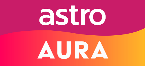 Logo saluran Astro Aura